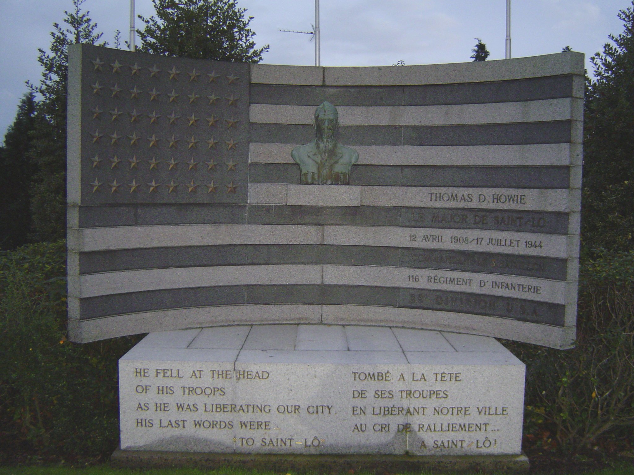 Monument Major-Howie, visible près du cimetière (angle Rue Mal Juin-Rue Mal de Lattre de Tassigny)